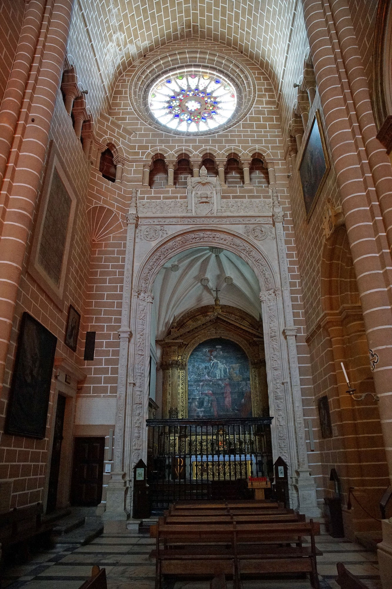 EVORA EVORA Cathedral (Wiki): EVORA (Wiki)